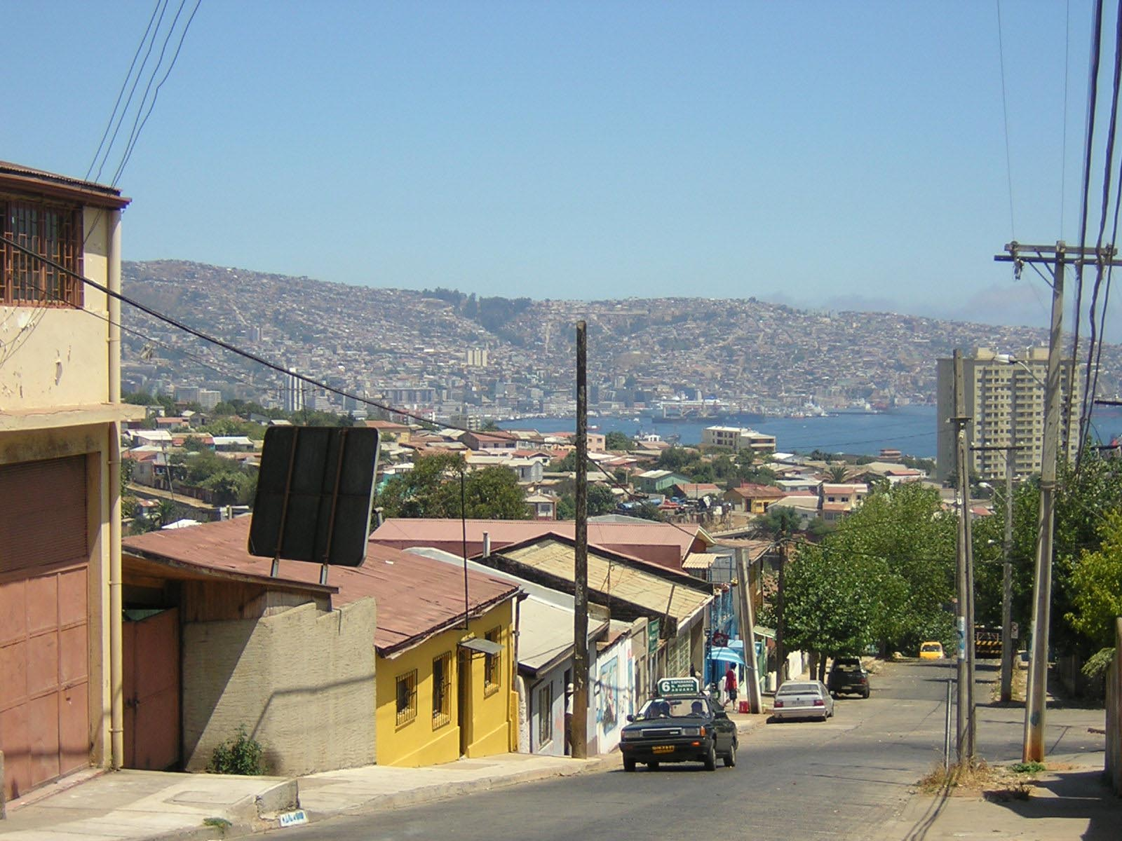 Cerro Esperanza, Valparaíso, Chile